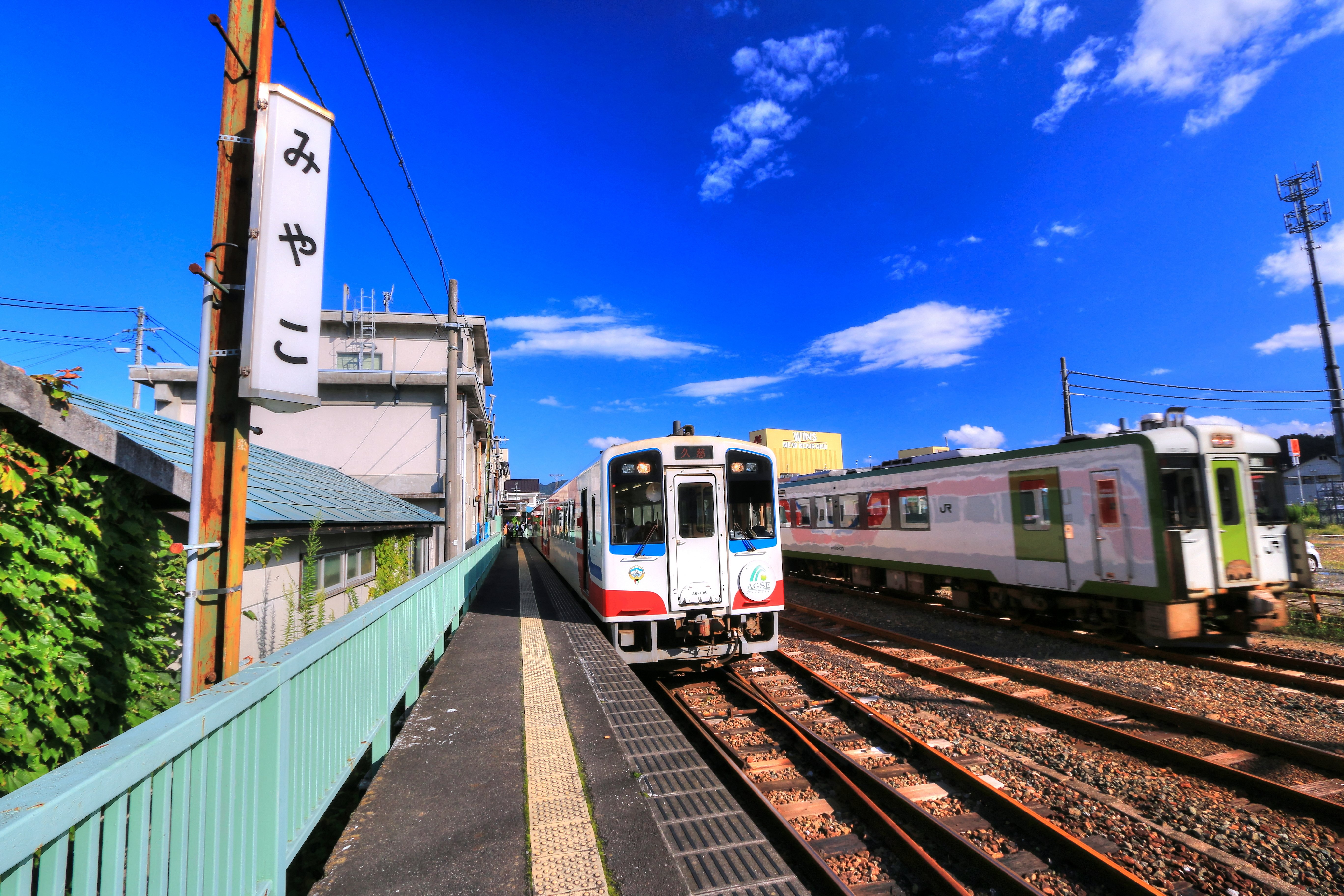 岩手県宮古市、宮古駅、三陸鉄道